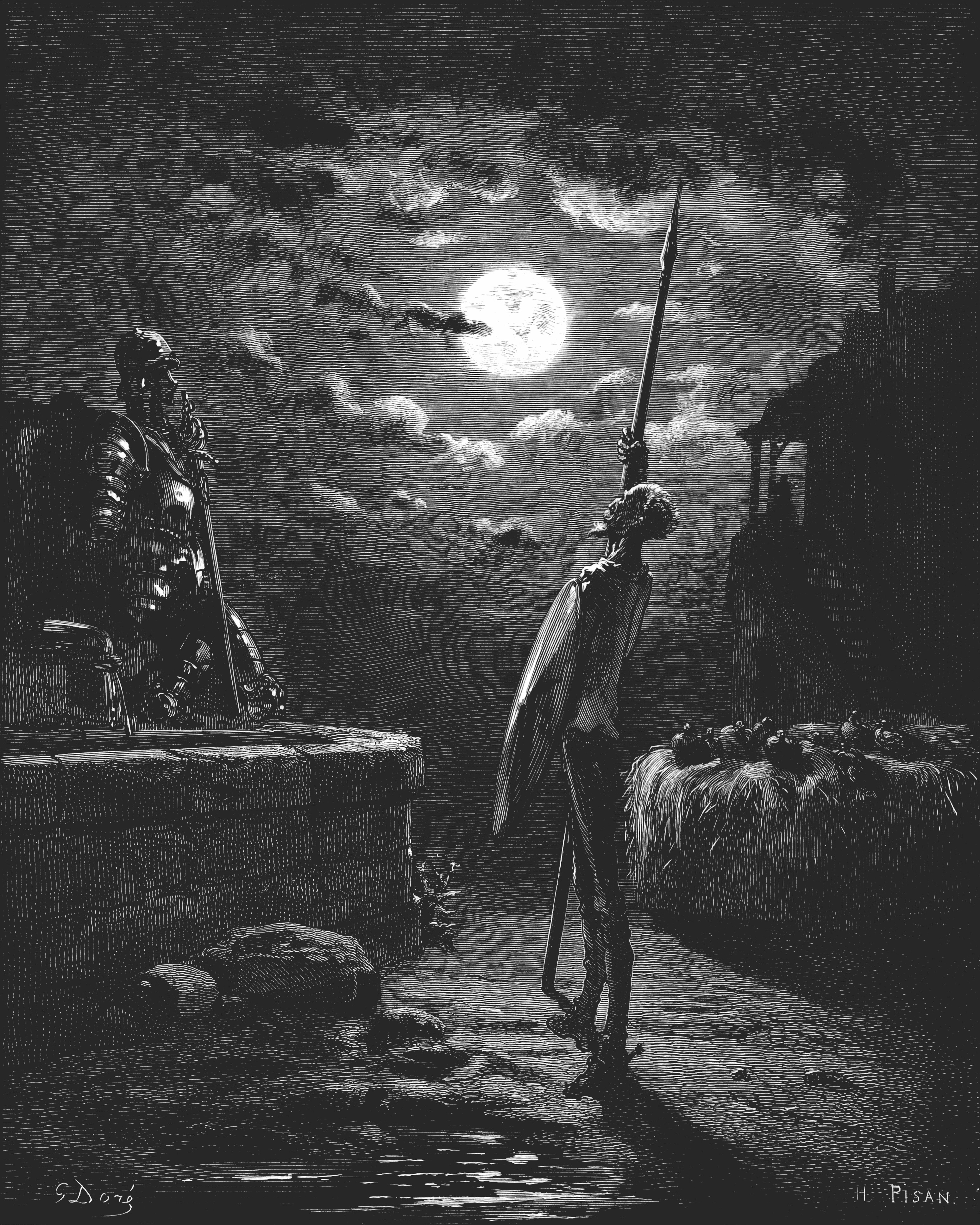 "Dom Quixote a velar armas" (1863), iIustração por Gustave Doré para “Don Quixote“ de Miguel de Cervantes.